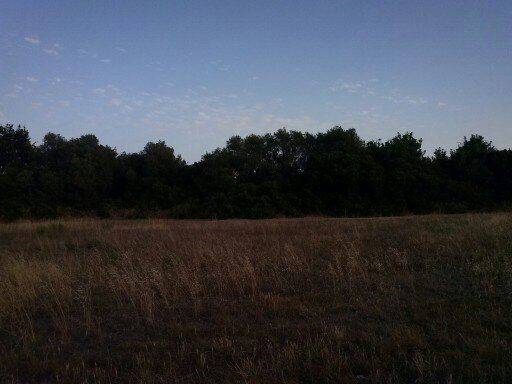 Torrente de Coanegra a su paso por Marratxí